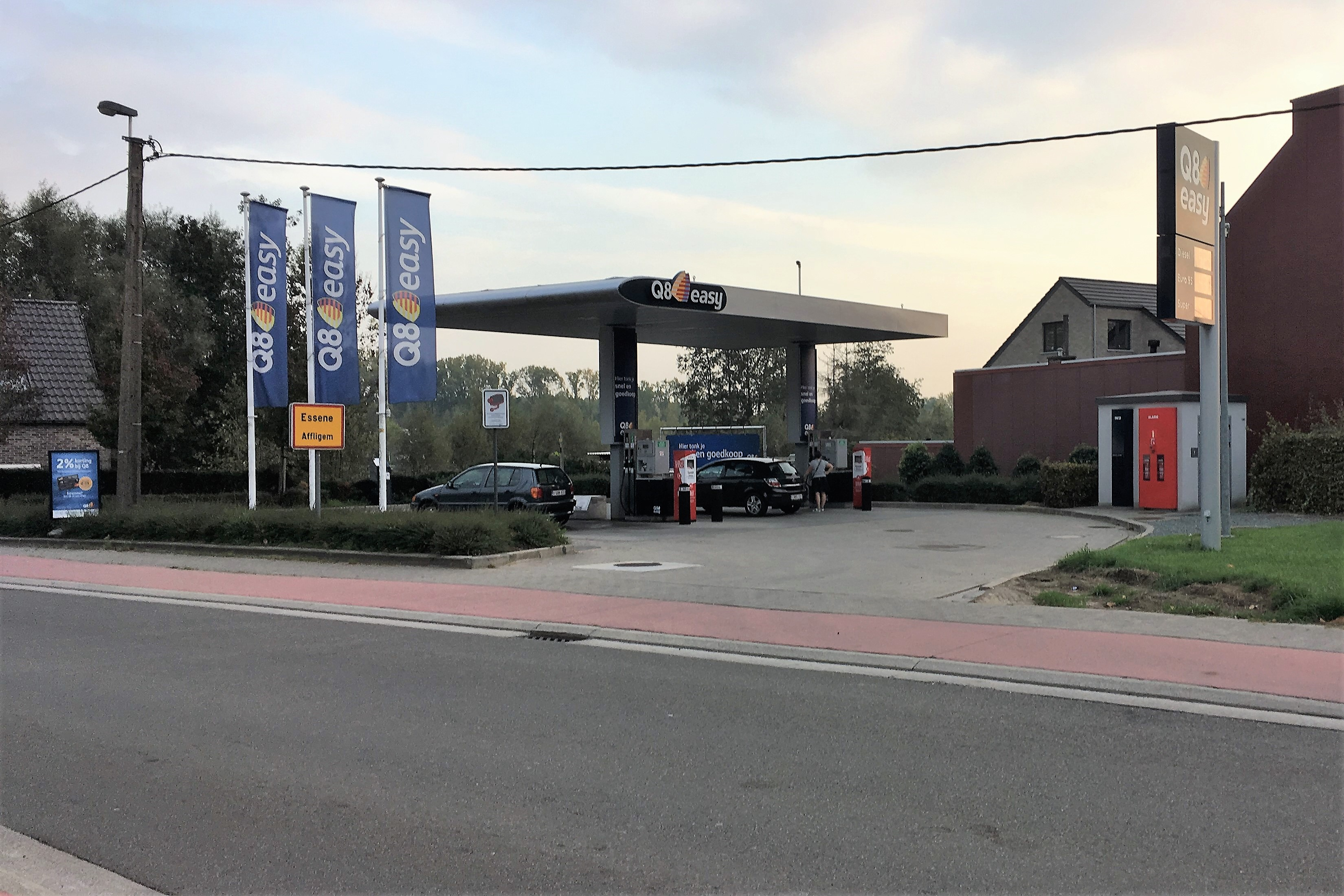 Q8 Easy-tankstation te Affligem vlakbij het op- en afrittencomplex van de A10/E40